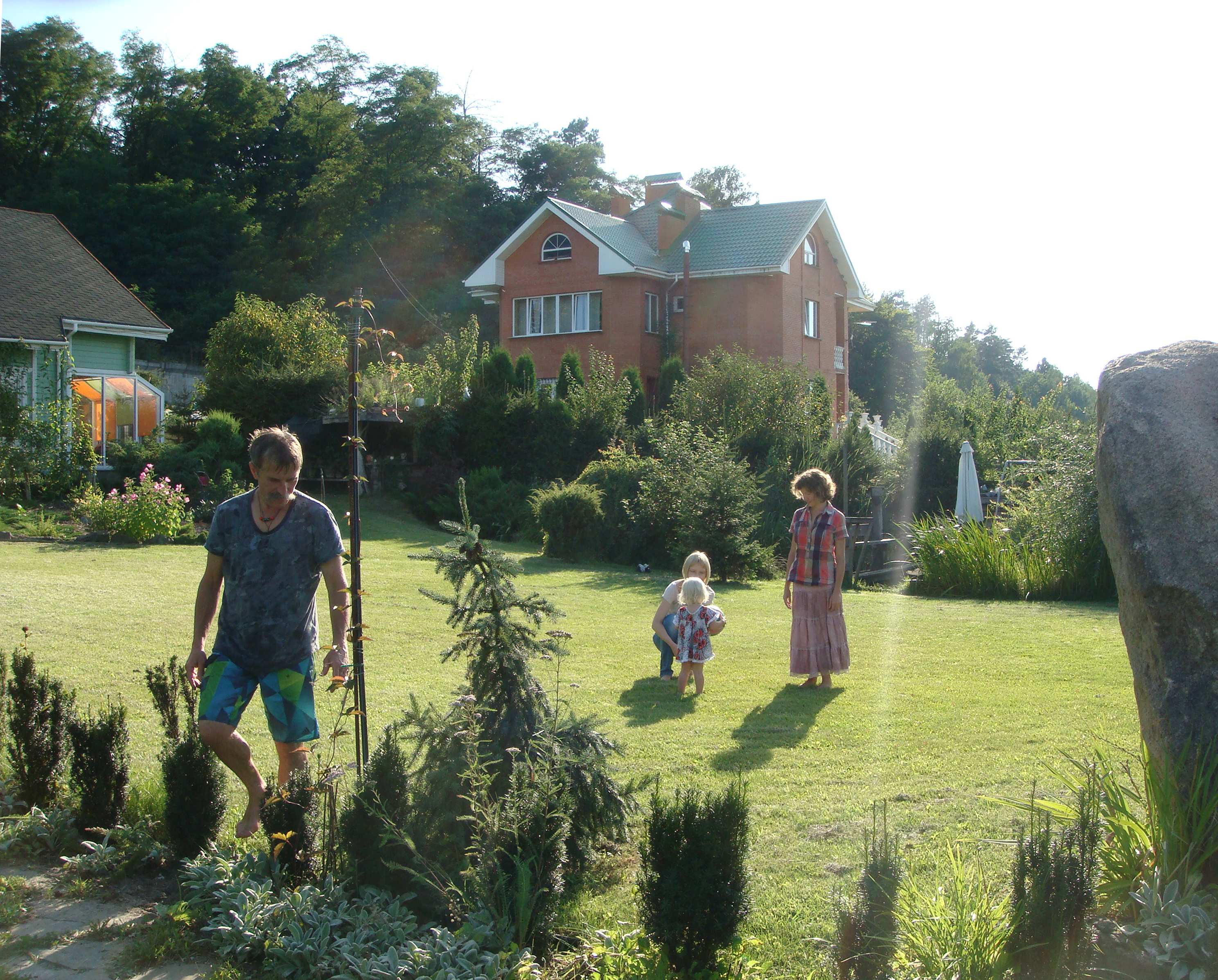 садиба Чаплинських